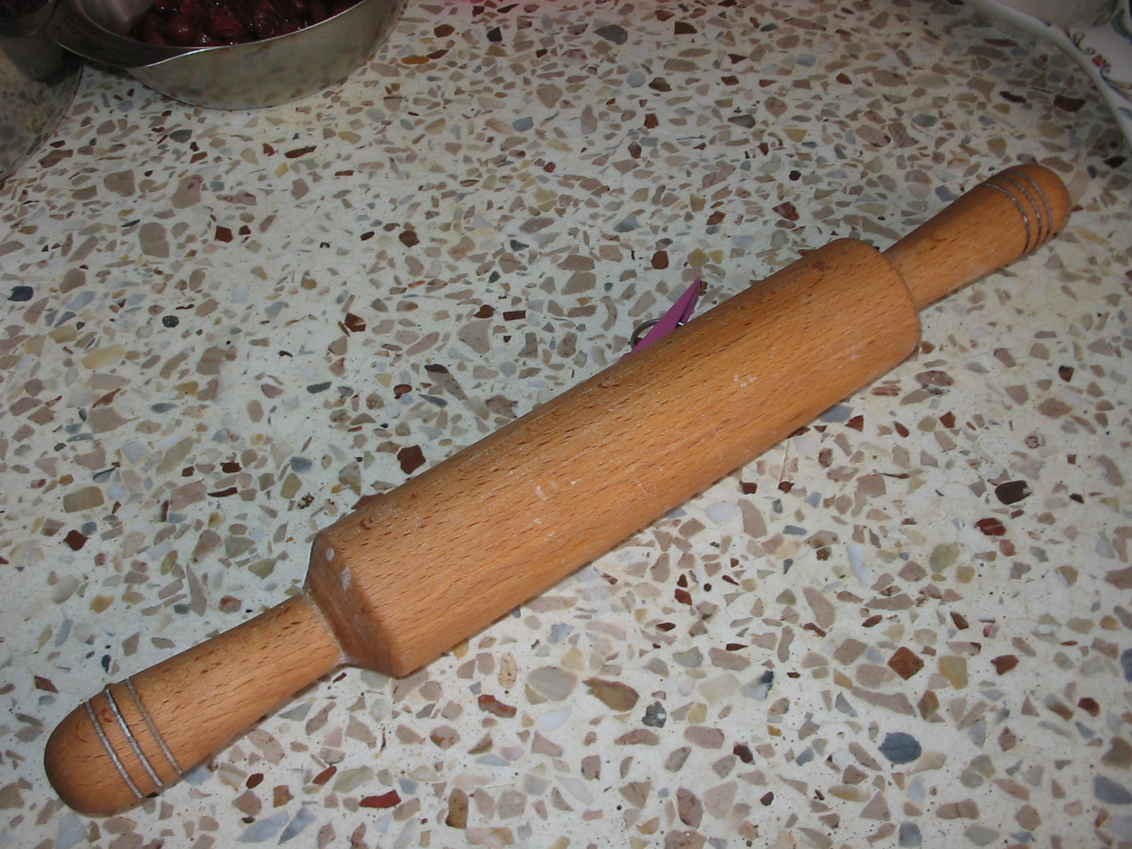 Скалка